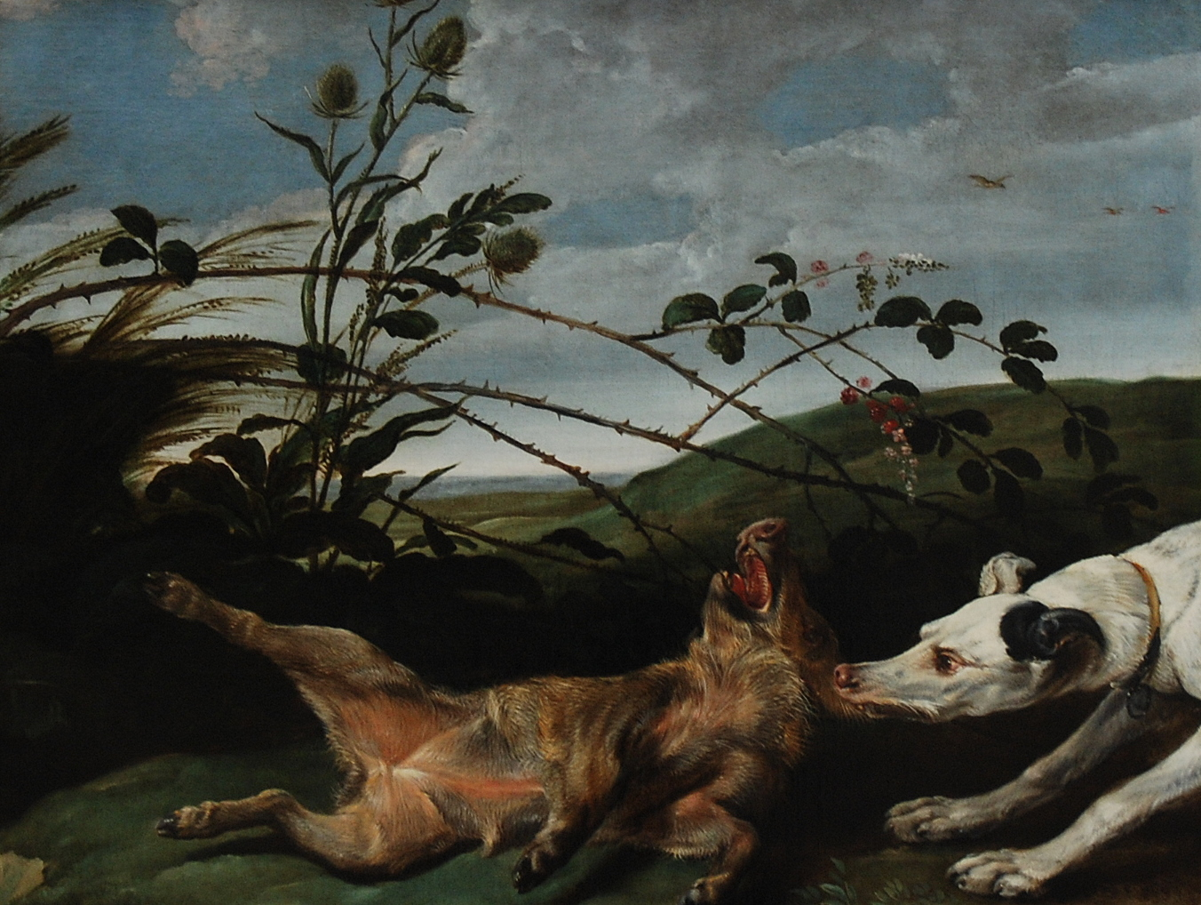 Jong everzwijn gegrepen door een jachthondA Greyhound Catching a Young Wild Boartitle QS:P1476,nl:"Jong everzwijn gegrepen door een jachthond" label QS:Lnl,"Jong everzwijn gegrepen door een jachthond" label QS:Lpl,"Młody dzik pochwycony przez psa myśliwskiego"